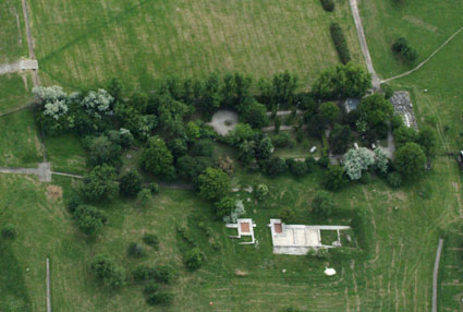 Kőtár - Római Limes - Dunaújváros - Hungary - Europe Kastell Dunaújváros (lat. Intercisa)